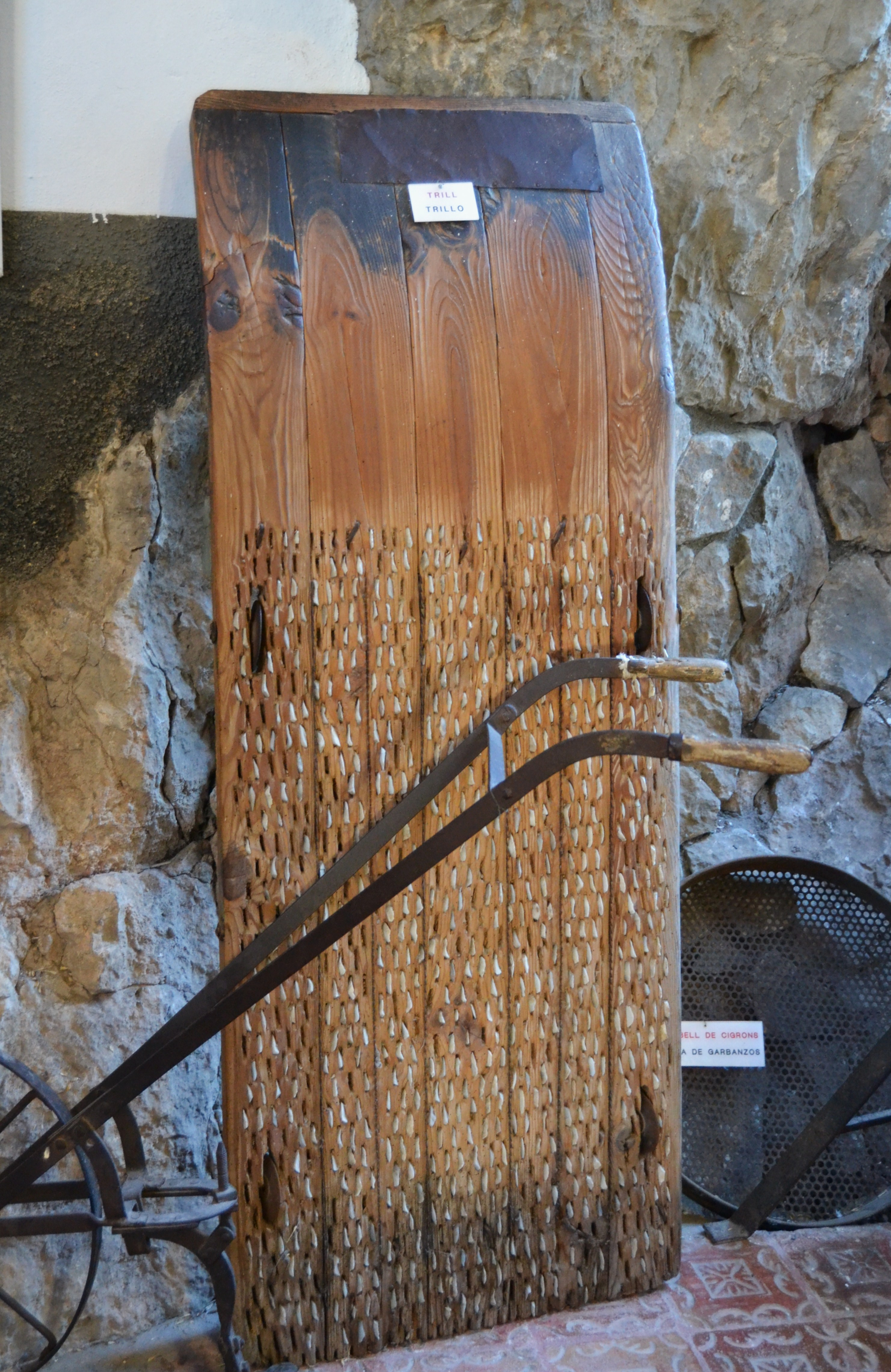 Museu Etnològic del Castell de Guadalest, trill.